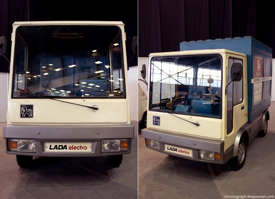 ВАЗ 2802-02 «Пони». Опытный образец элекрогрузовика. Тольяттинский автосалон 2012